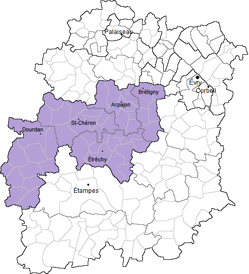 Carte de la troisième circonscription de l'Essonne (91)